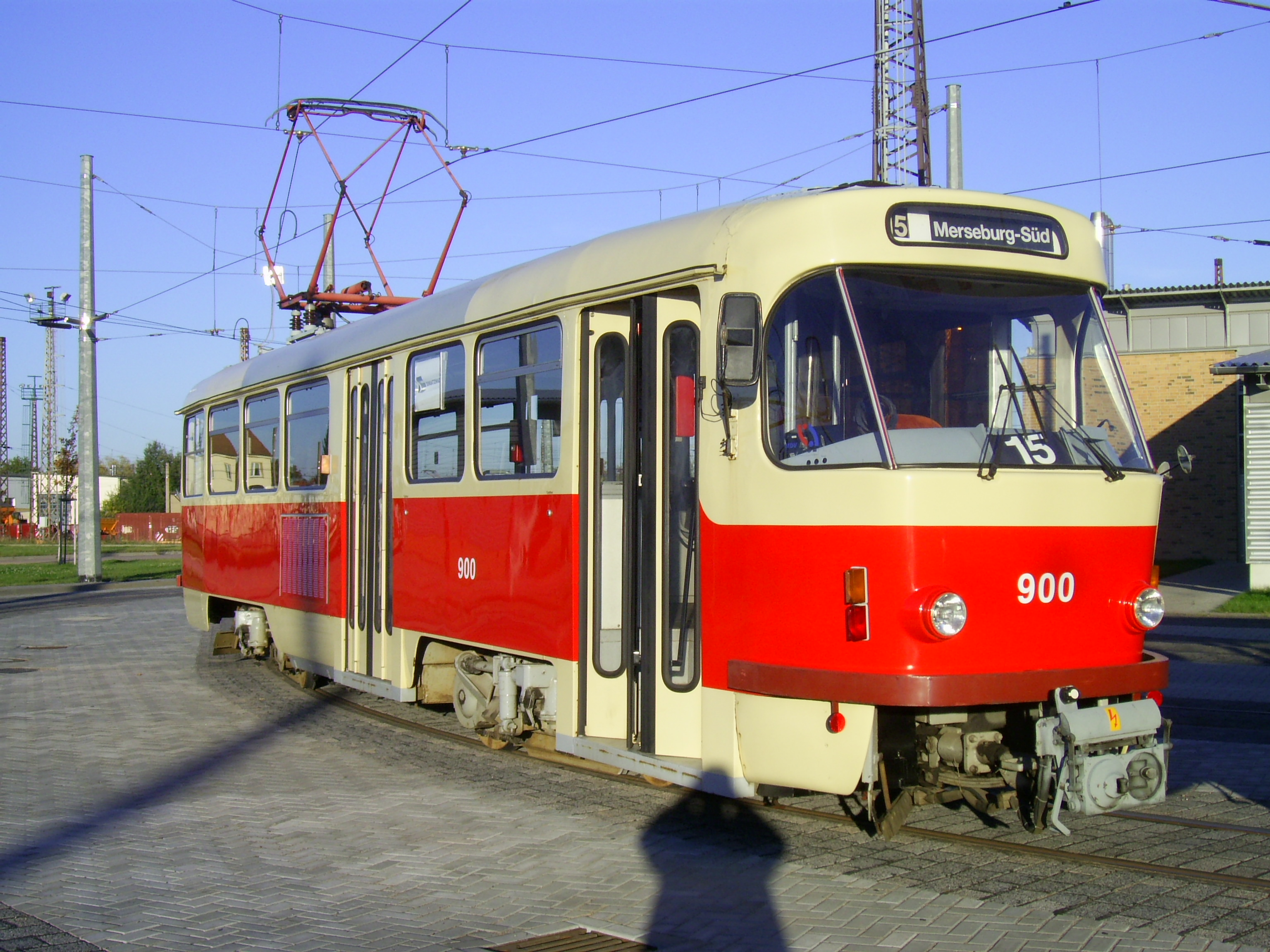 Tw 900 der Straßenbahn Halle, im Bild die ursprünglich türlose linke Seite